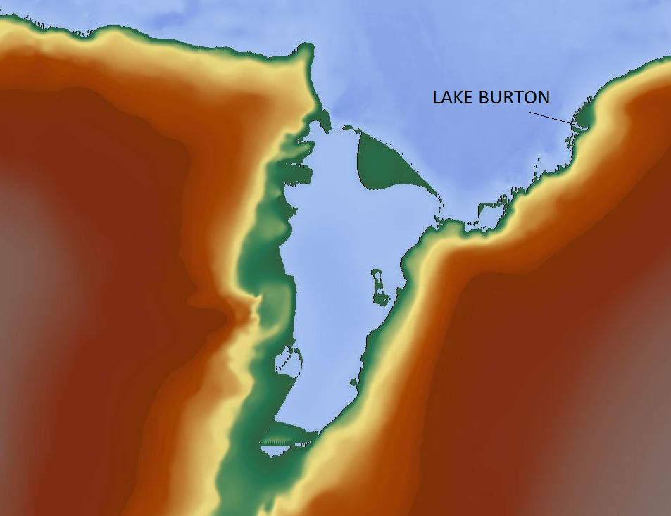 Relief map of Lake Burton